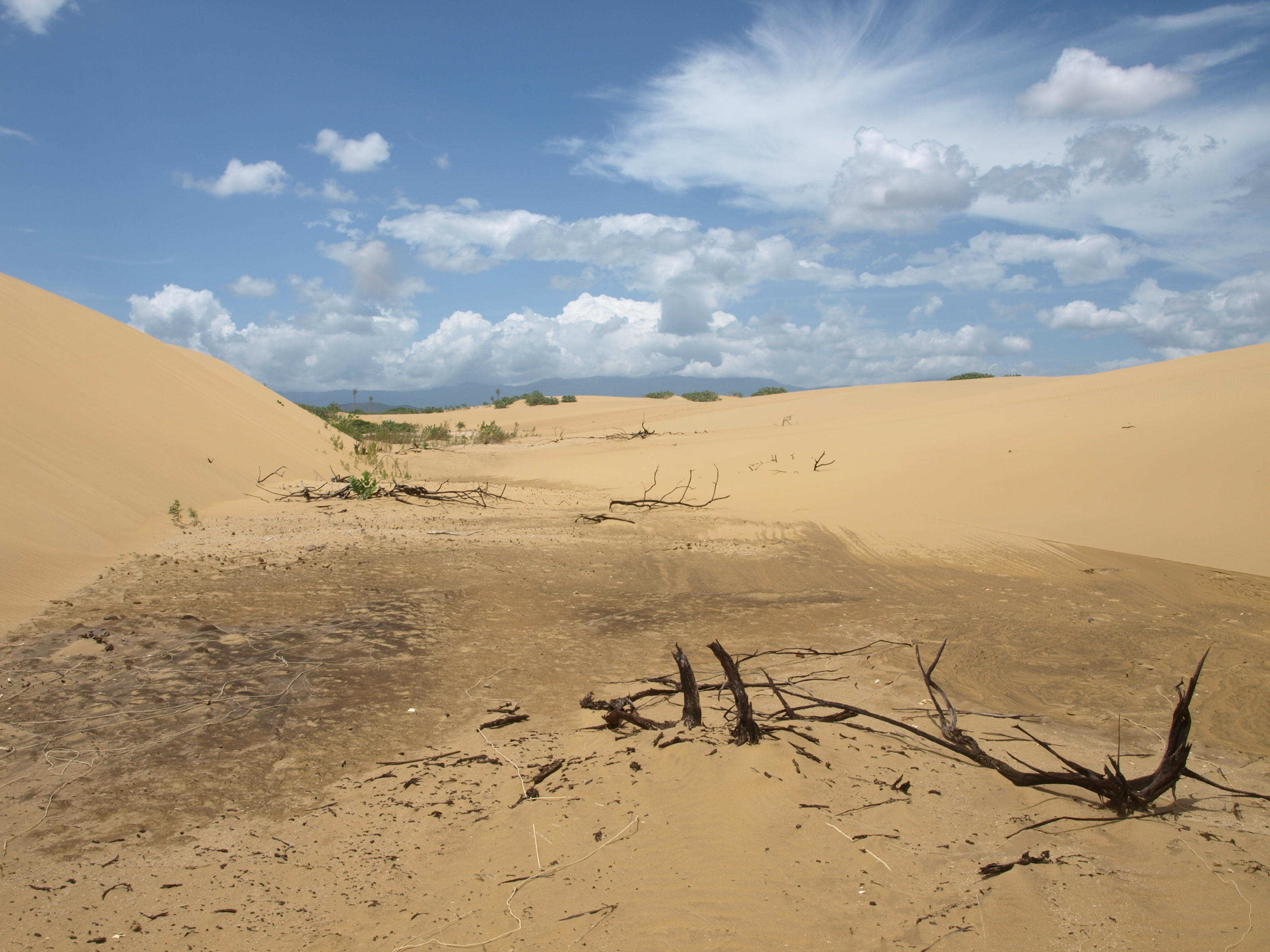 Lo que el viento no se llevo.